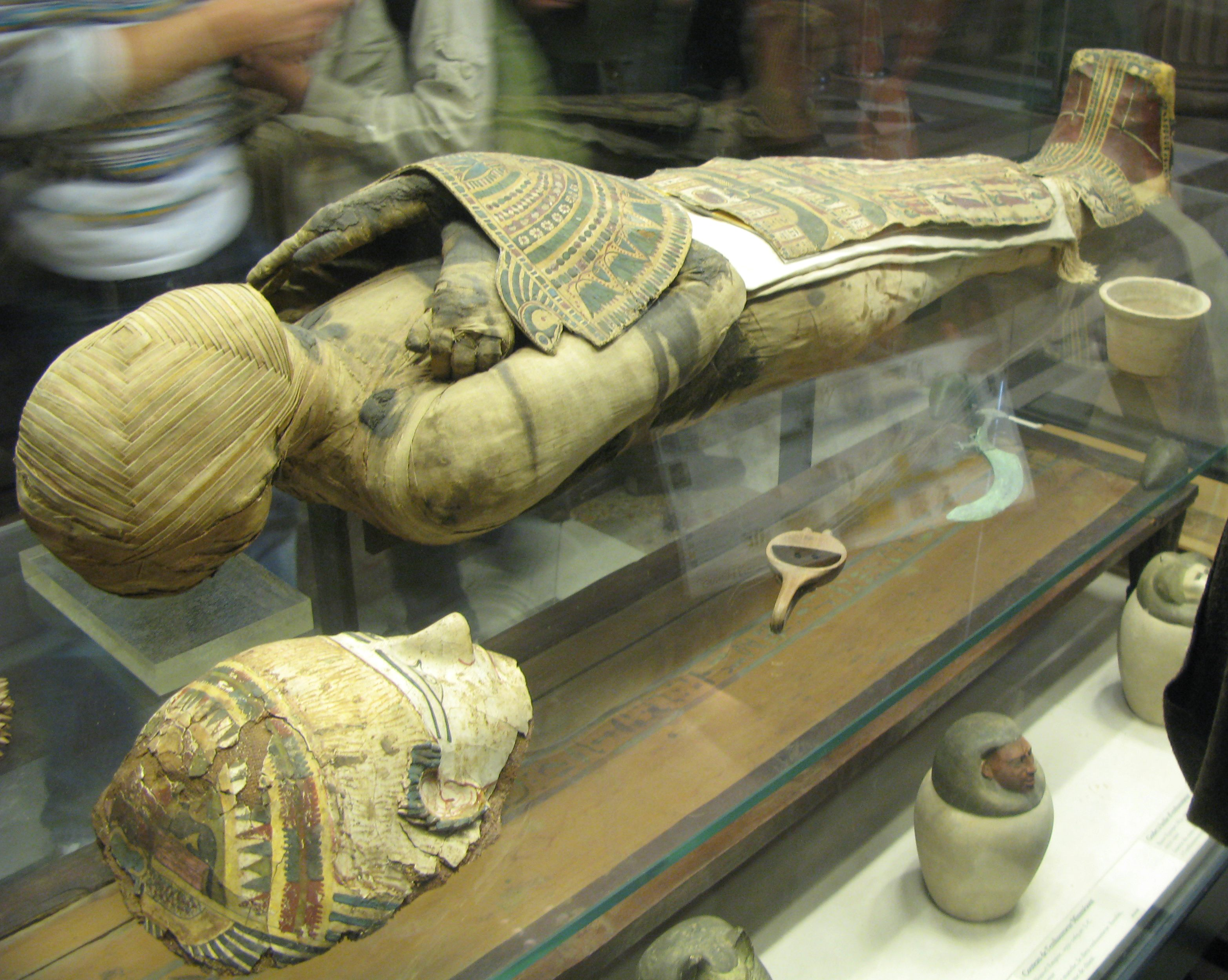 Egyptian mummy, époque ptolémaïque, IIIe - IIe siècle avant J.-C., Louvre,Département des Antiquités égyptiennes, N 2627